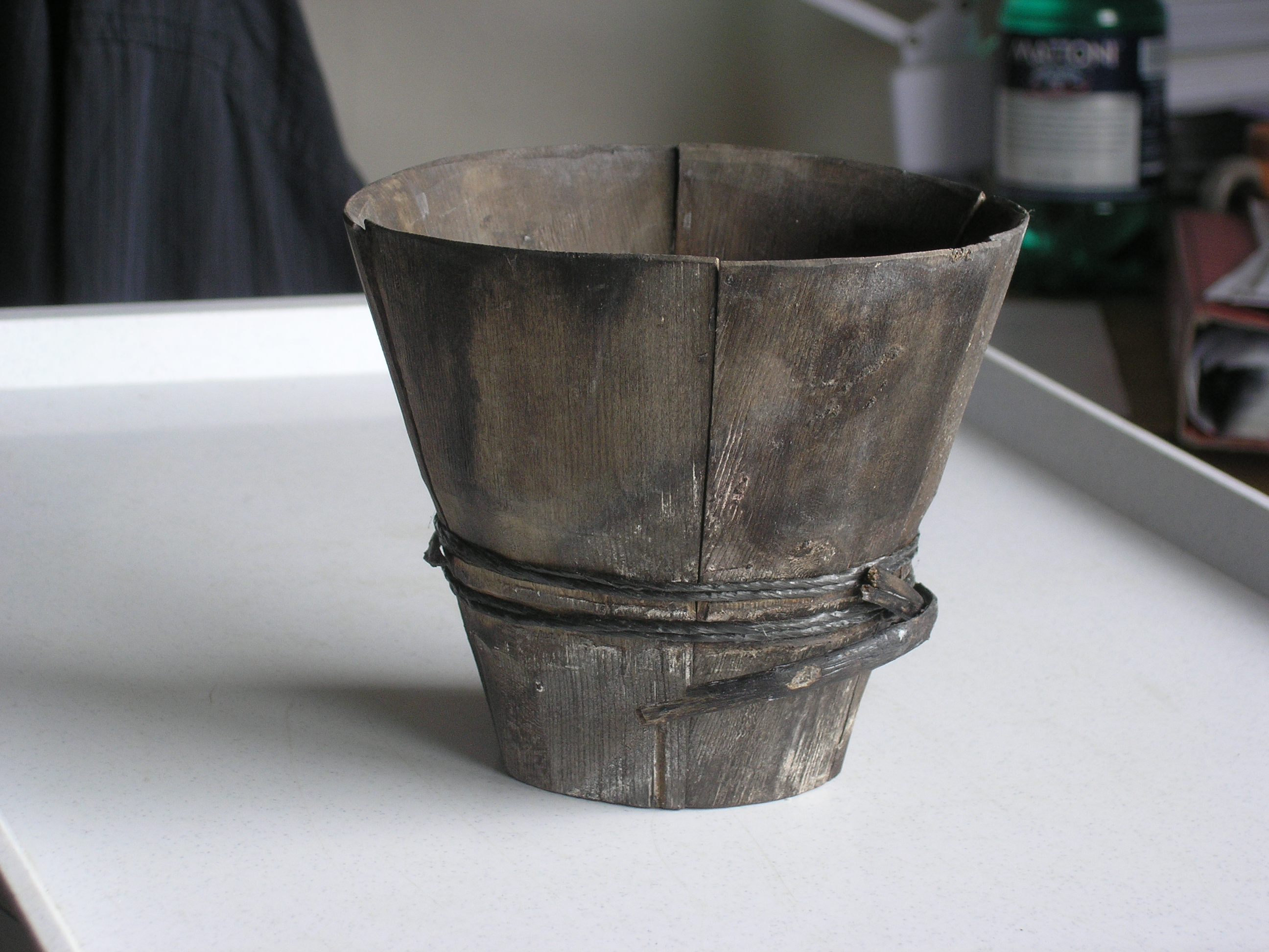 Archeologický artefakt: Dýhová miska, 15.-16. stol., lokalita Plzeň Perlová ul. čp. 66/67, vrstva 0310